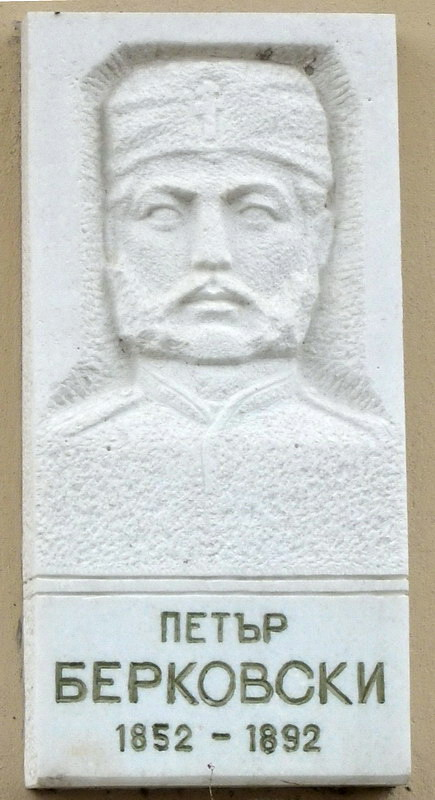 Село Берковски, община Попово. Плоча на стените на кметството с революционера, дал името си на селото.